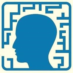 סמל המייצג נגישות לאנשים עם מוגבלות שאינה נראית (מוגבלות שכלית, נפשית, תקשורתית ולקויות למידה)